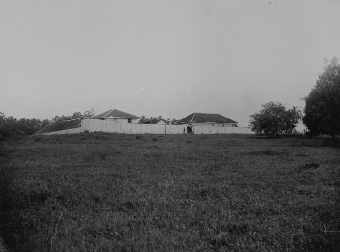 foto. Een benteng bij Teloekbetoeng